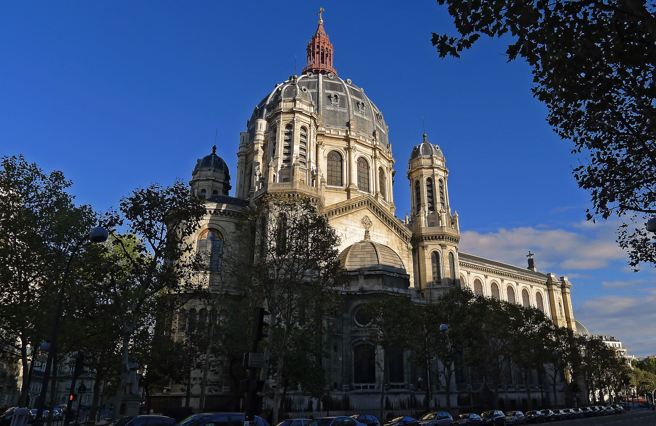 Église Saint-Augustin - Paris VIII